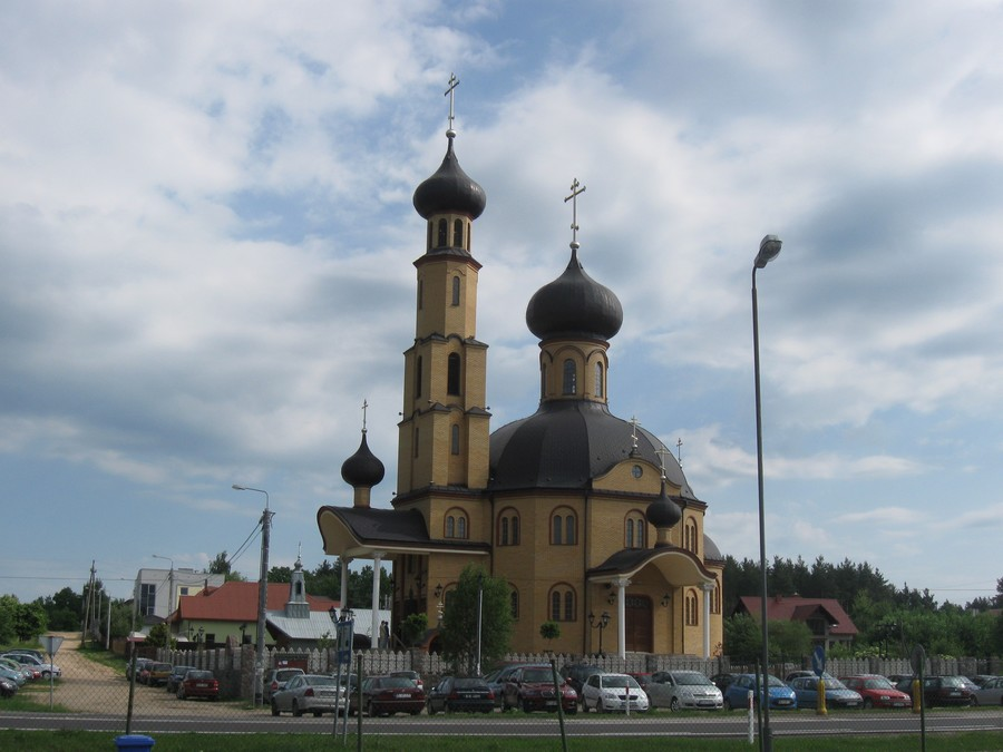 Zaścianki, cerkiew